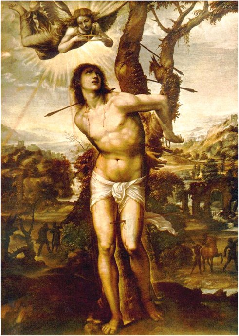 Sodoma: Hl. Sebastian, 1525–27, Florenz